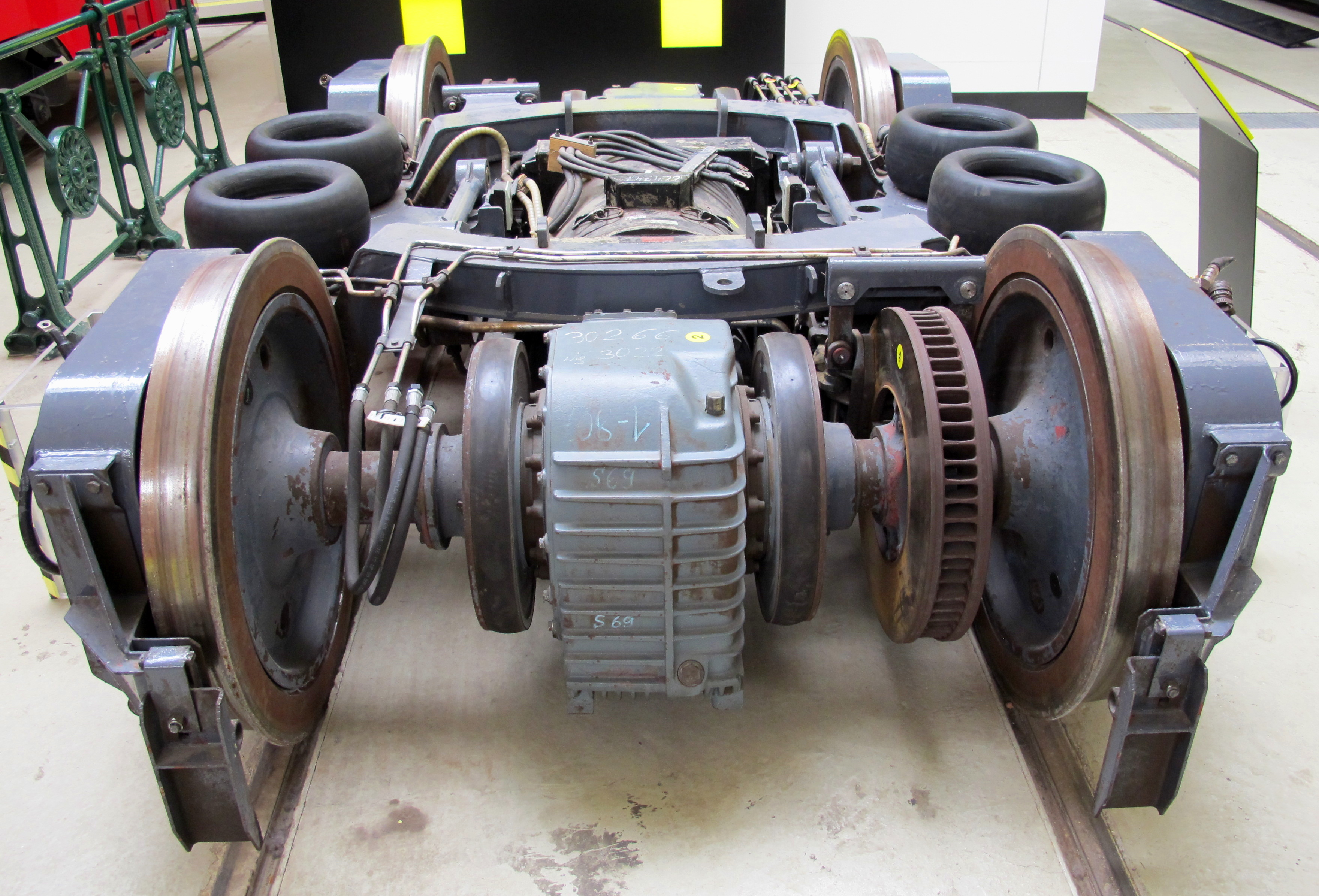 Wiener Straßenbahnmuseum - Triebdrehgestell eines Triebwagens des Typs U mit Tandemantrieb